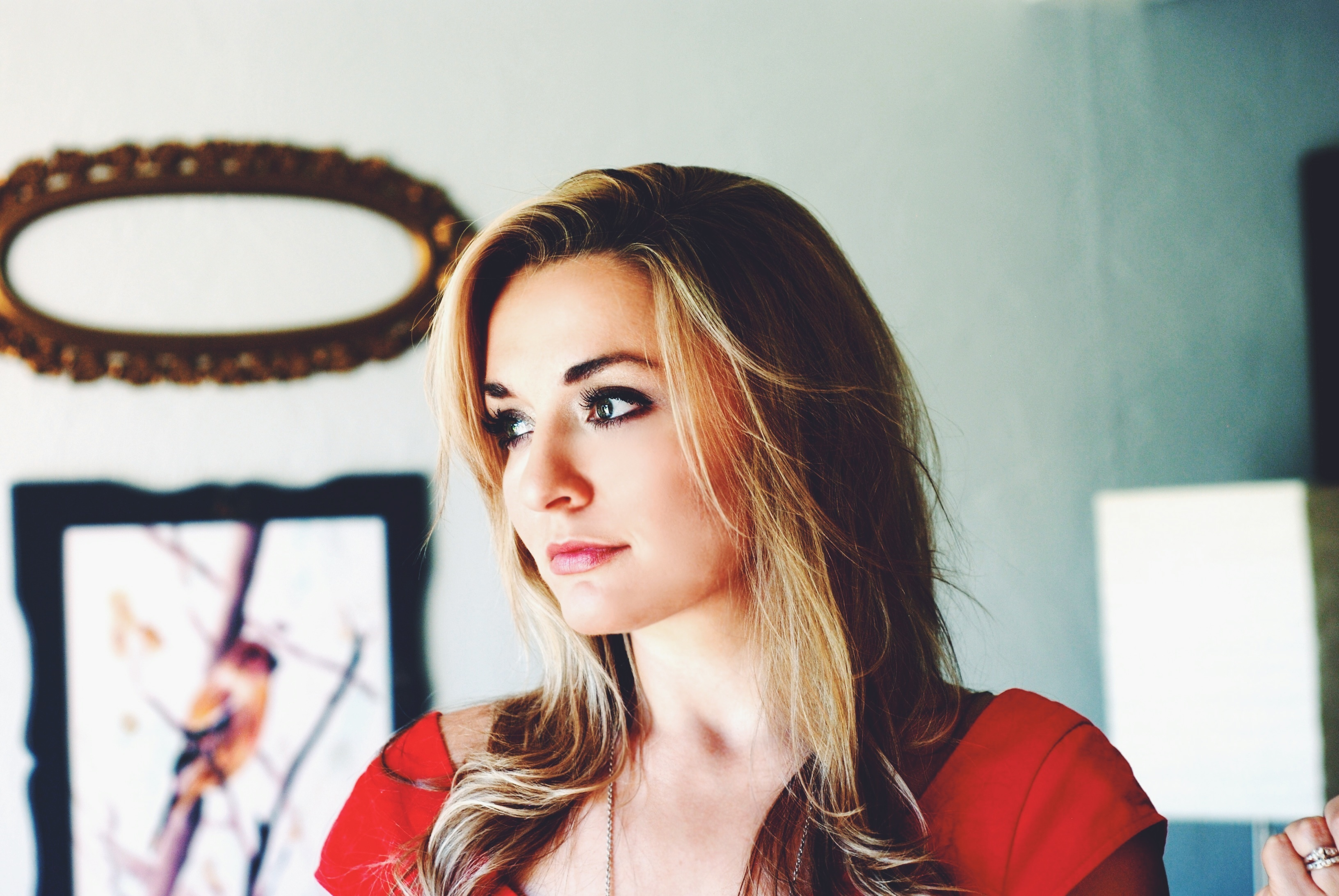 Anna Gilbert